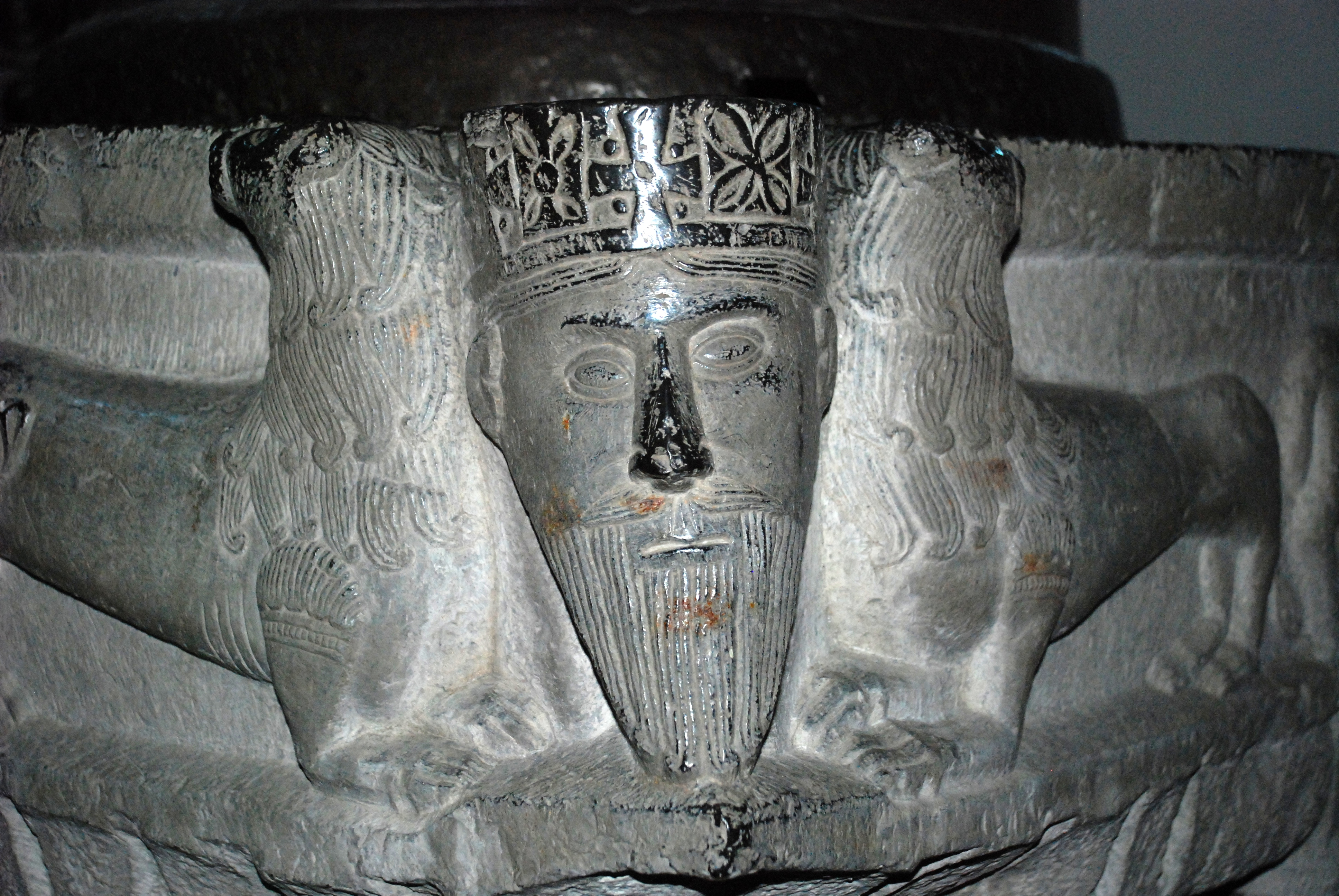 Belgique - Wallonie - Fonts baptismaux de Saint-Séverin-en-Condroz